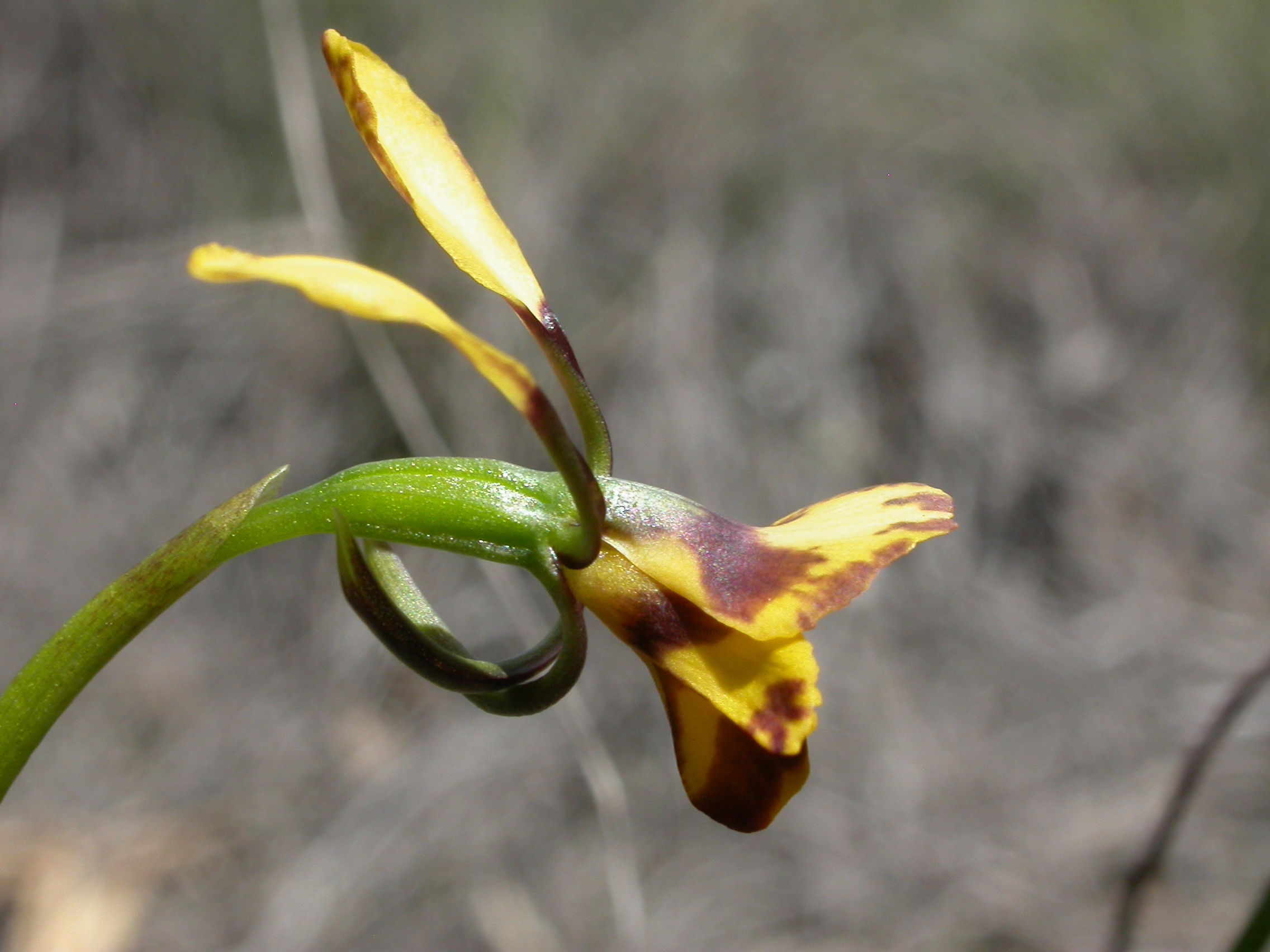 Diuris semilunulata Messmer, Aranda Bushland, Canberra, ACT, 16 October 2010